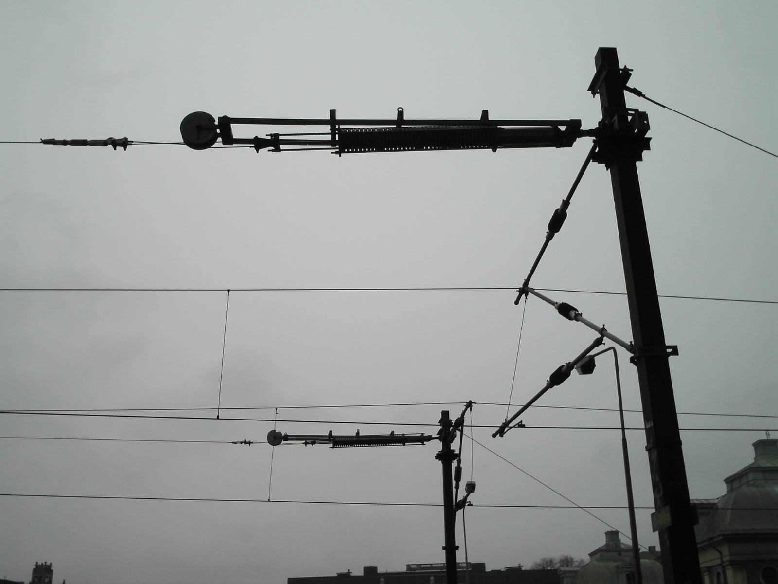 Spännfjäder